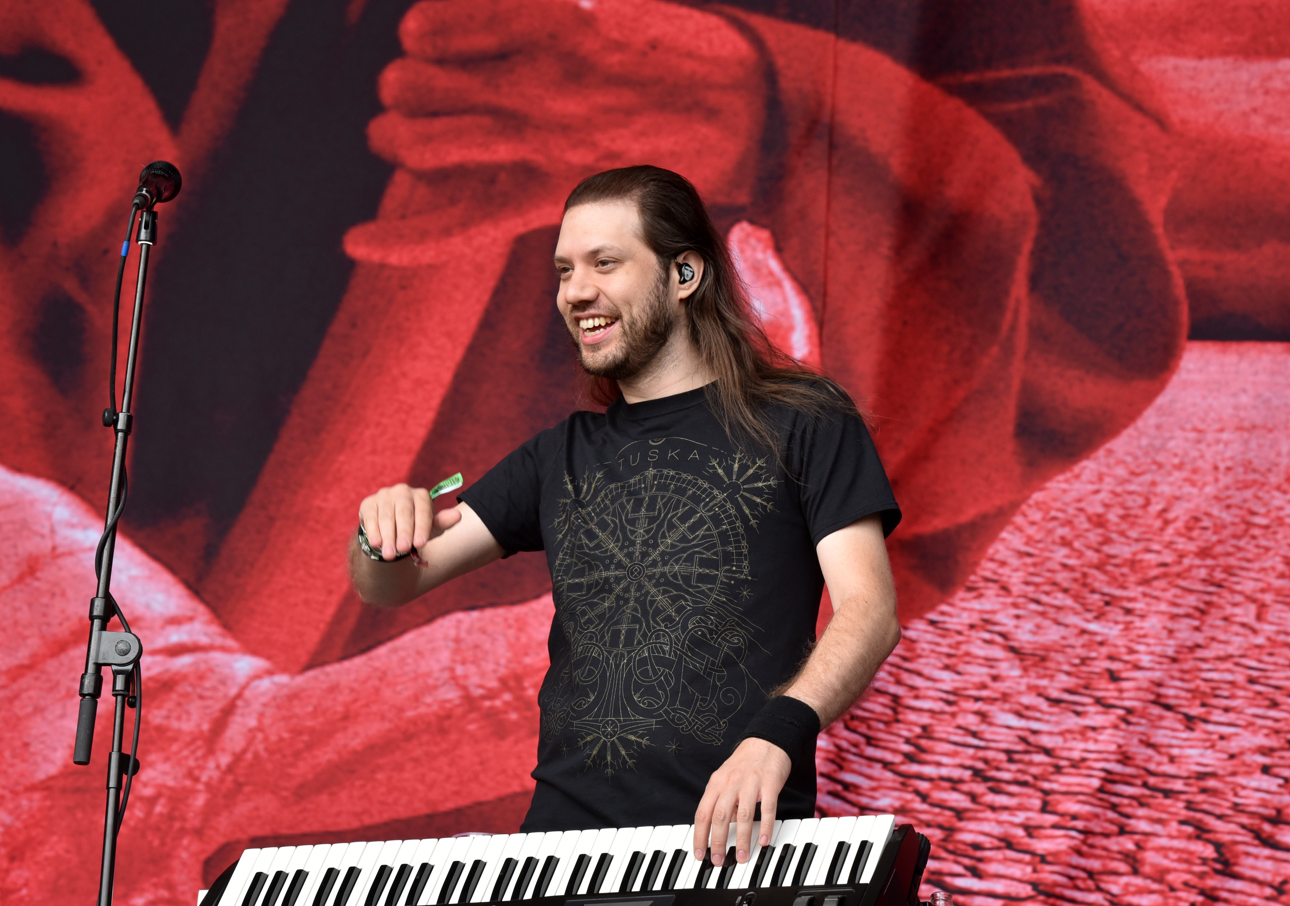 Children of Bodom beim Elbriot 2017